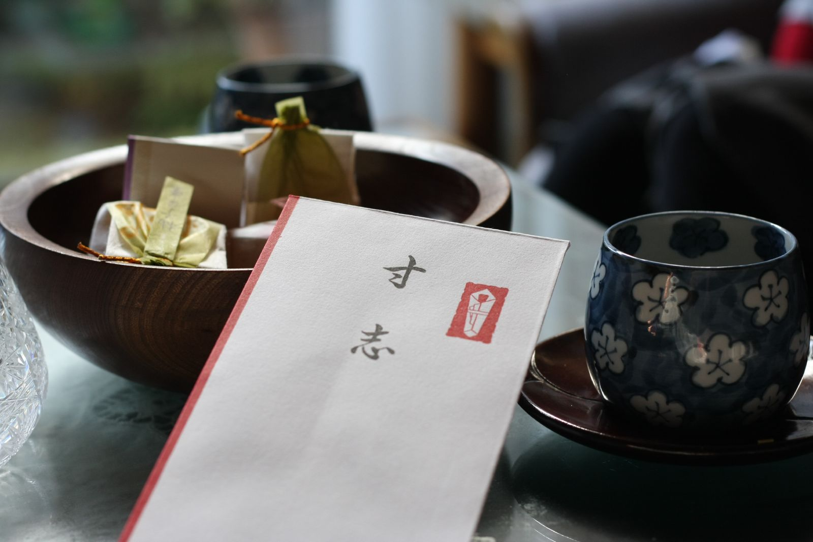 ひい婆ちゃんから頂いた、初めてのお年玉。 ちゃんと取っておくからね、ゆづ。 ※別途 masa & kiyoko からも頂きました。ありがと。